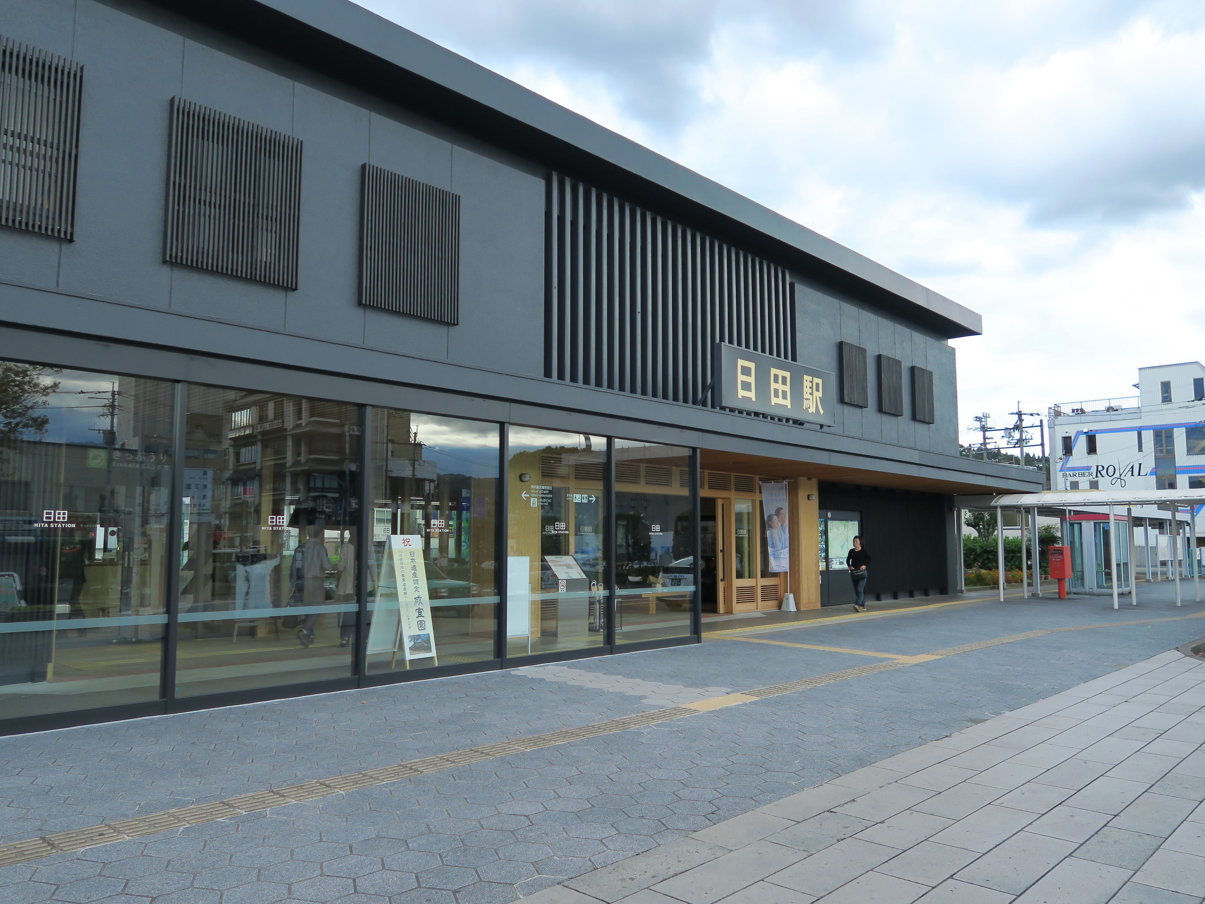 大分県日田市 日田駅駅舎（リニューアル後）